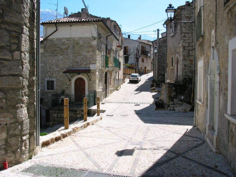 Roccacaramanico, Caramanico Terme, Abruzzo, Italia